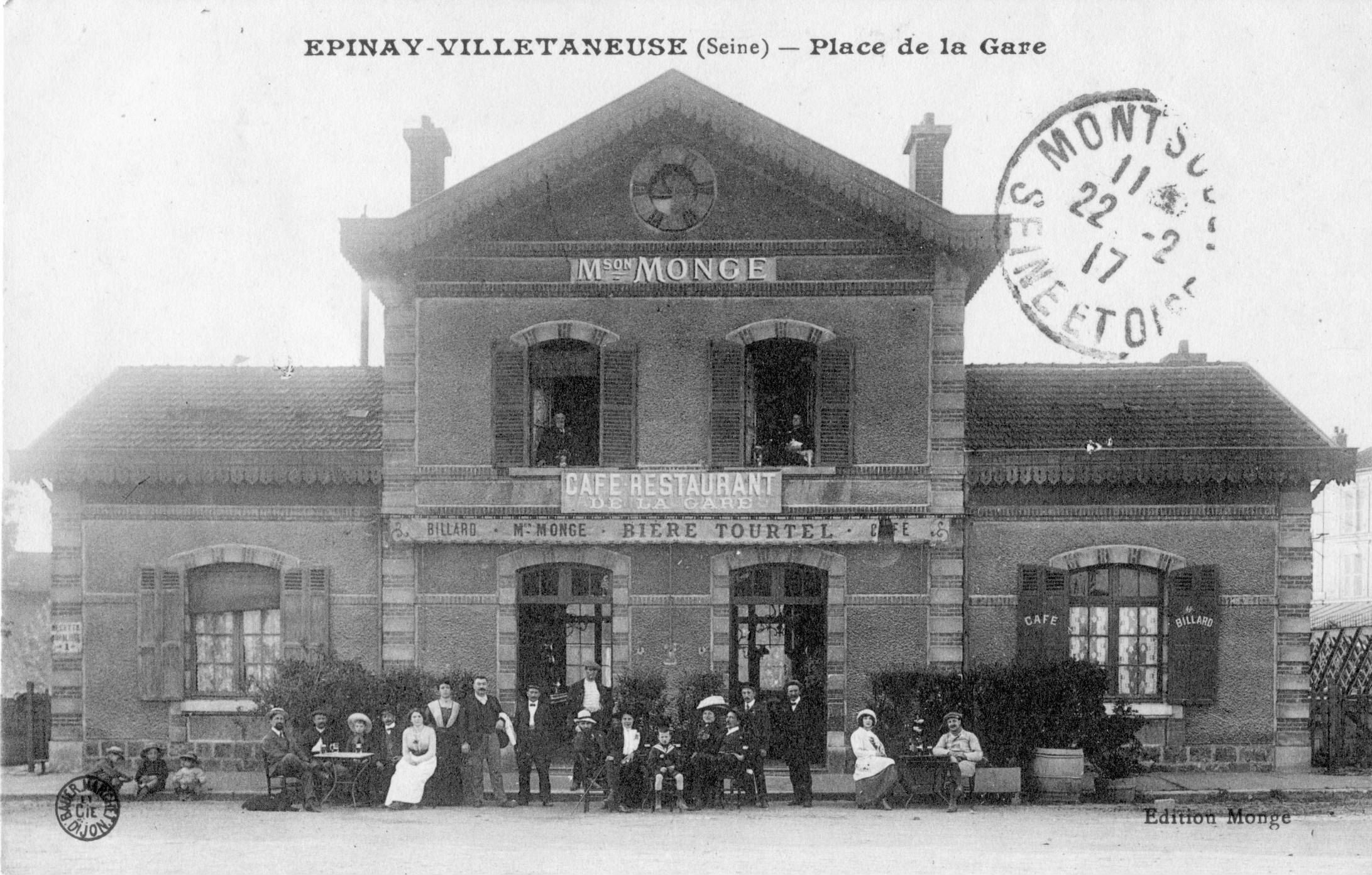 Carte postale ancienne éditée par Monge EPINAY-VILLETANEUSE : Place de la Gare Il s'agit de l'ancienne gare de la ligne de Grande Ceinture, déja transformée en café-restaurant en 1917